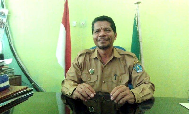 Kepala Madrasah kini MTsN 1 Kendari